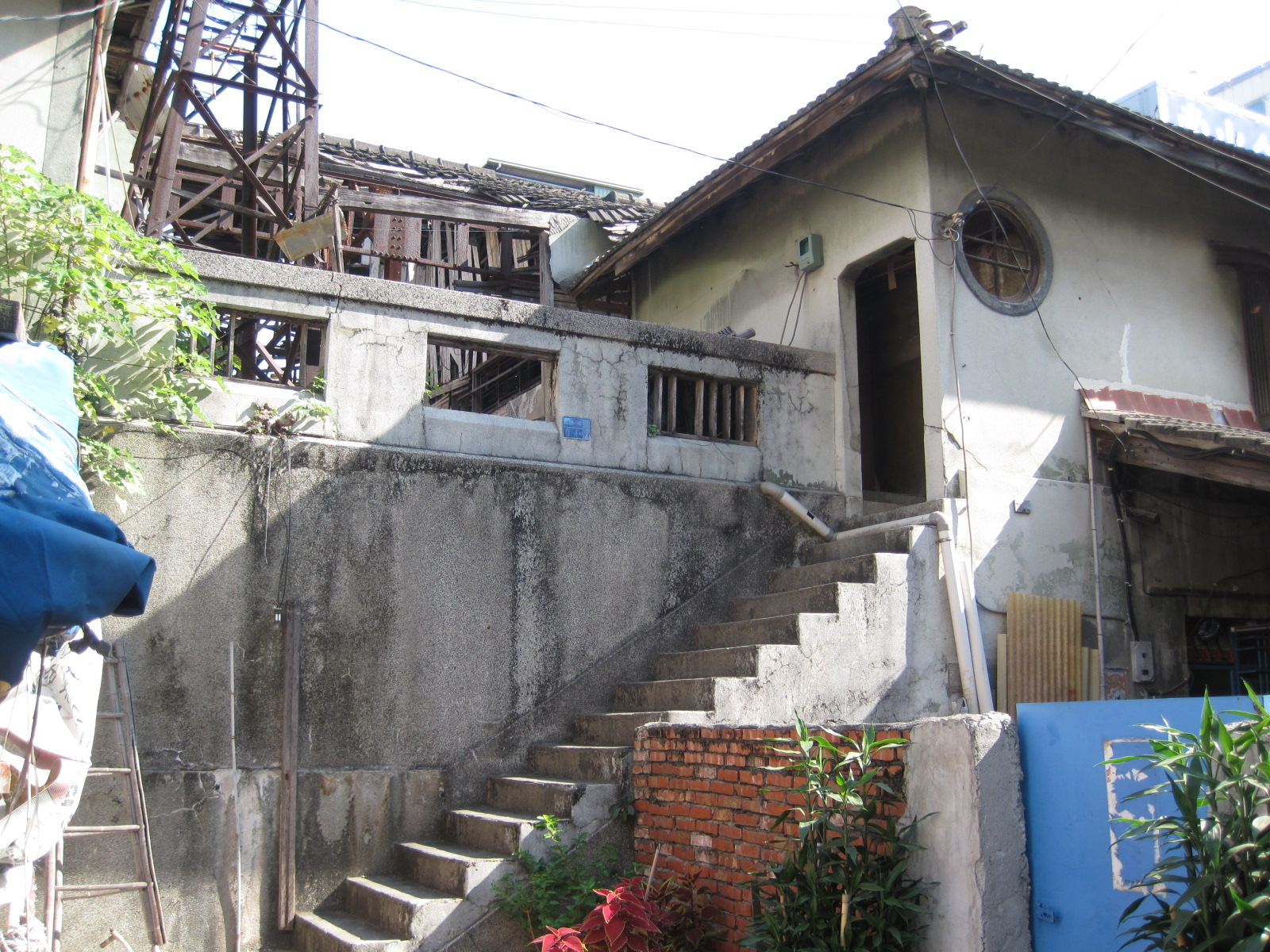 高雄市歷史建築，逍遙園。